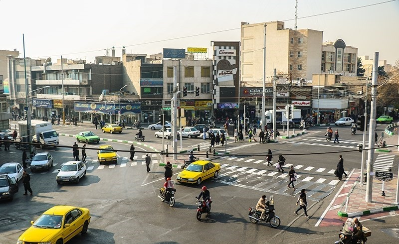 پیروزی